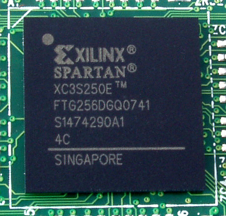 Xilinx FPGA XC3S250